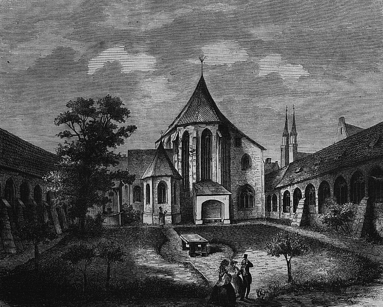 Klosterhof des Karthäuserkloster Nürnbergs, aus "Die Gartenlaube" 1859